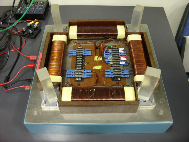 Epstein frame, aparat Epsteina